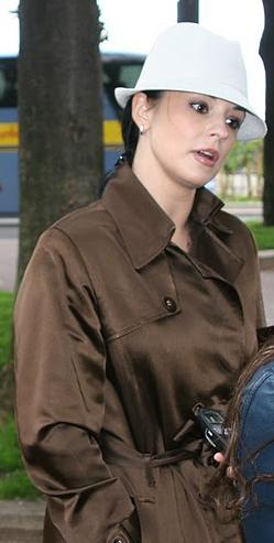 Andreea Marin, incognito, la Cannes, 9 Aprilie 2008.